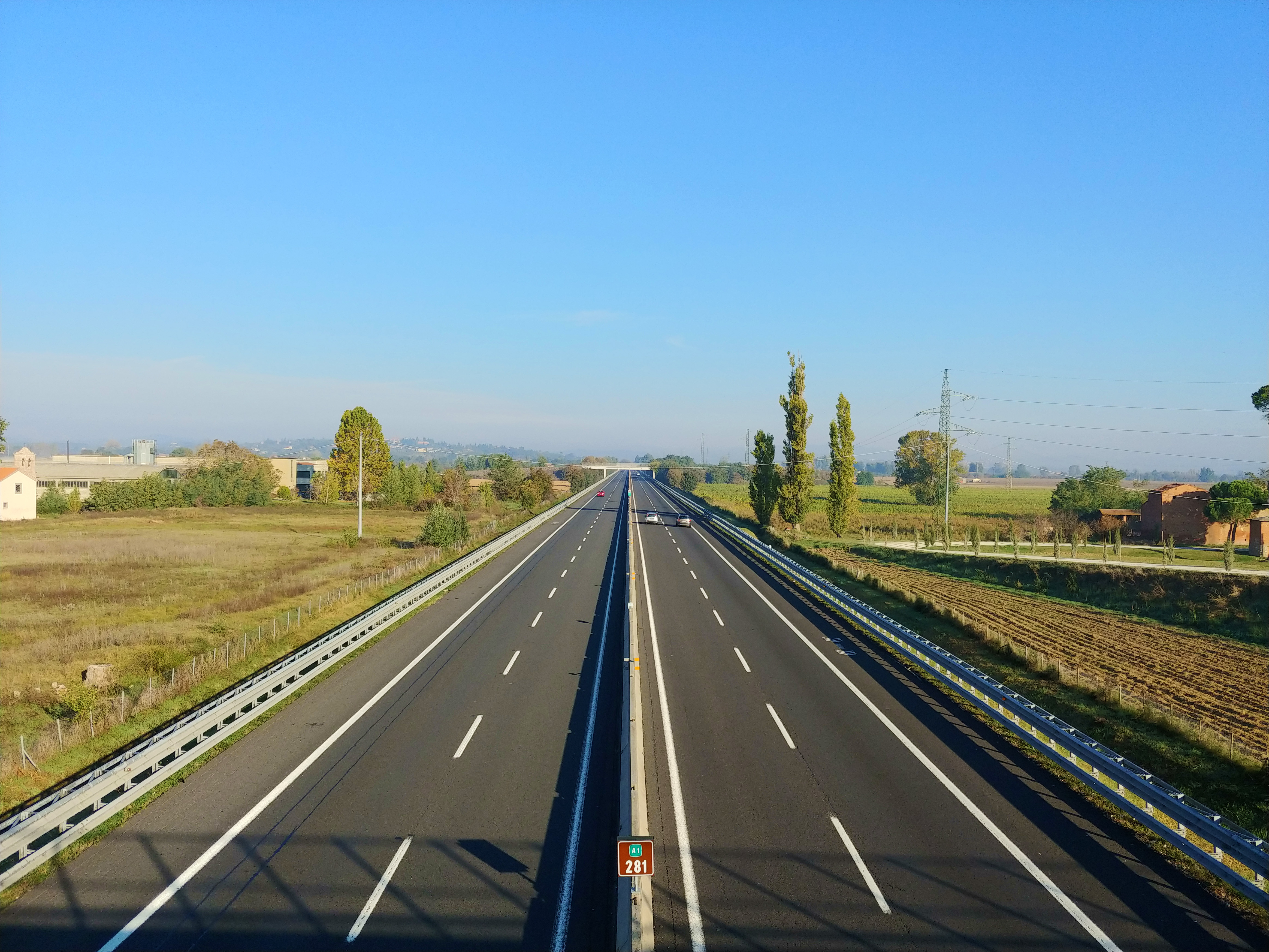 Autostrada A1 dal cavalcavia n° 281 in direzione Firenze .